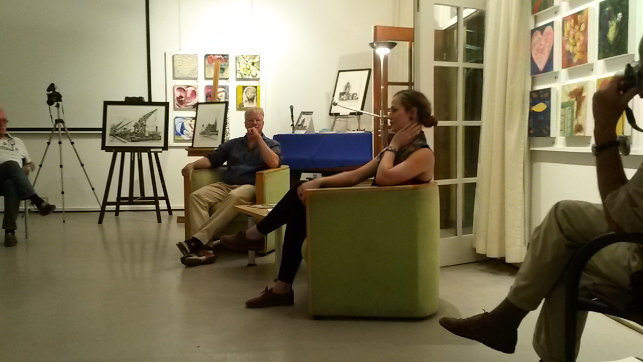 Launch der 21. Felsgrafitti am 23.11.2015 im Goethe-Zentrum Windhoek. Elke Le Roux im Gespräch mit Heiko Denker